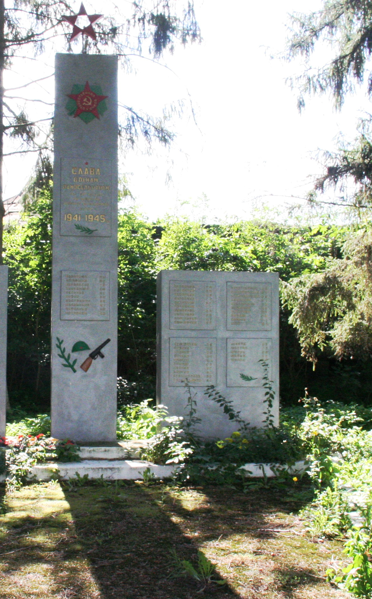 Пам'ятник односельчанам, які загинули під час війни с.Слобідка Ярмолинецький р-н